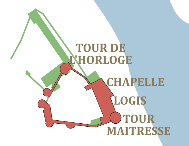 Plan schématique du château de Laval au XVème siècle, superposé au château actuel.